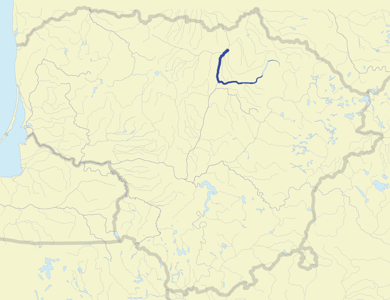 River Lėvuo